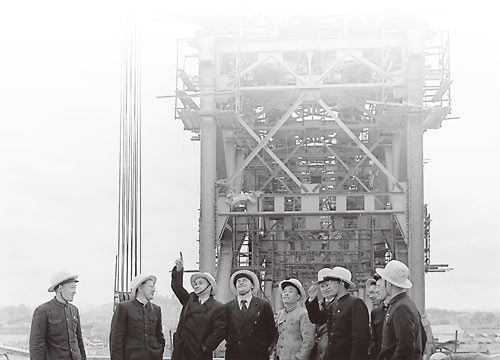 中、苏专家在建设中的武汉长江大桥，左三者为苏联专家组组长康斯坦丁·谢尔盖耶维奇·西林